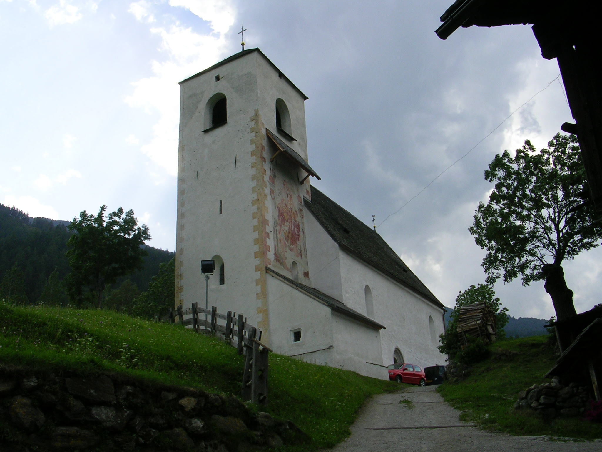 Church St. Nikolaus in Matrei in Osttirol